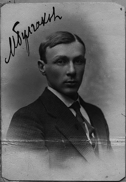 Булгаков Михаил Афанасьевич, студент Киевского университета Св. Владимира, 1916 г. Фонд-16, опись. 465, дело. 6111, стр. 157.